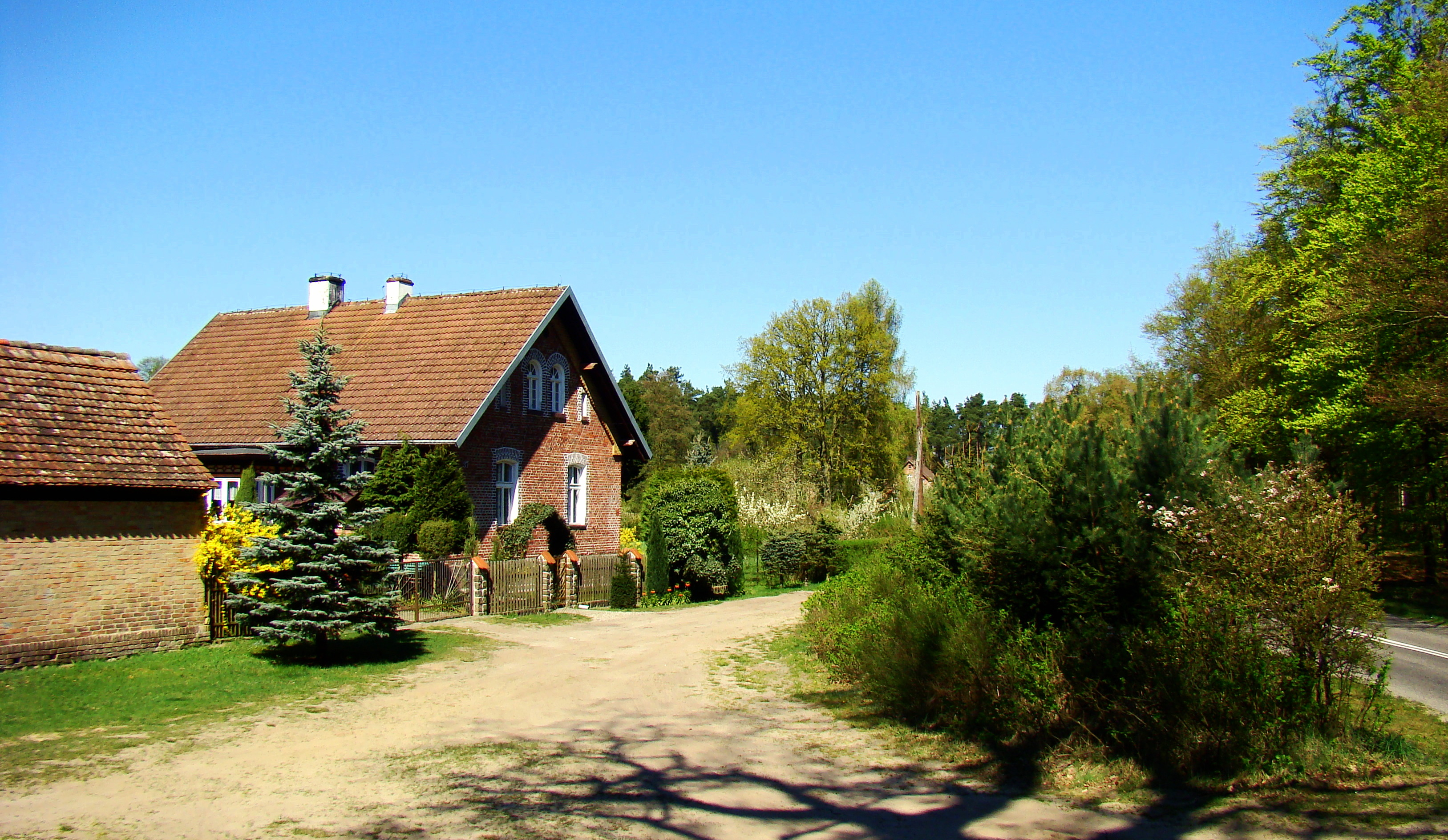 Mazańczyce k. Trzebieży, Puszcza Wkrzańska, (Gmina Police, Województwo zachodniopomorskie), Polska